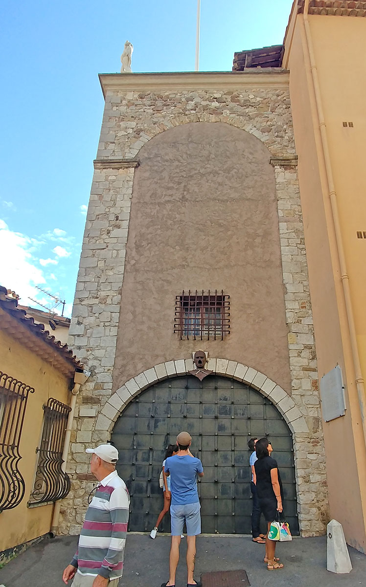 Ultimo refugio del hombre de la mascara de hierro en Cannes